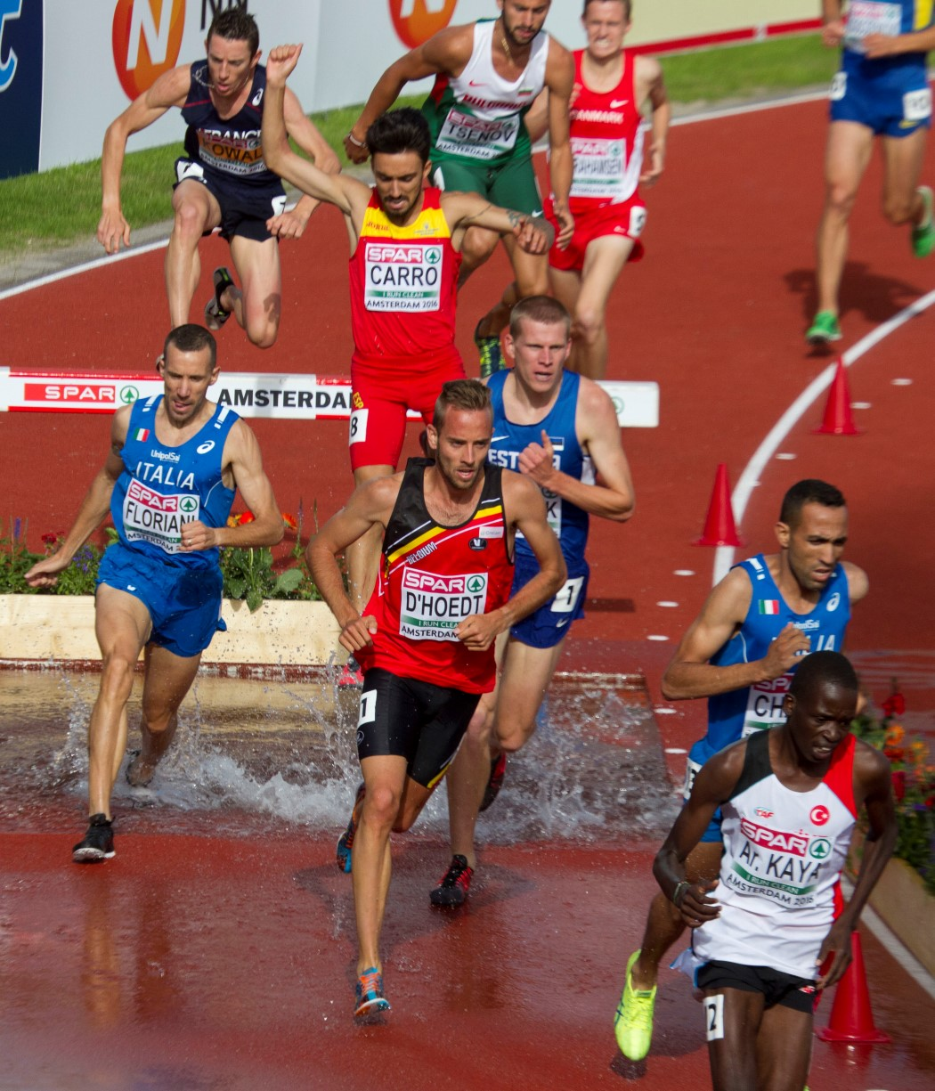 0204 steeple reeksen dhoedt